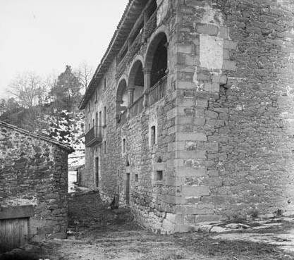 Imatge